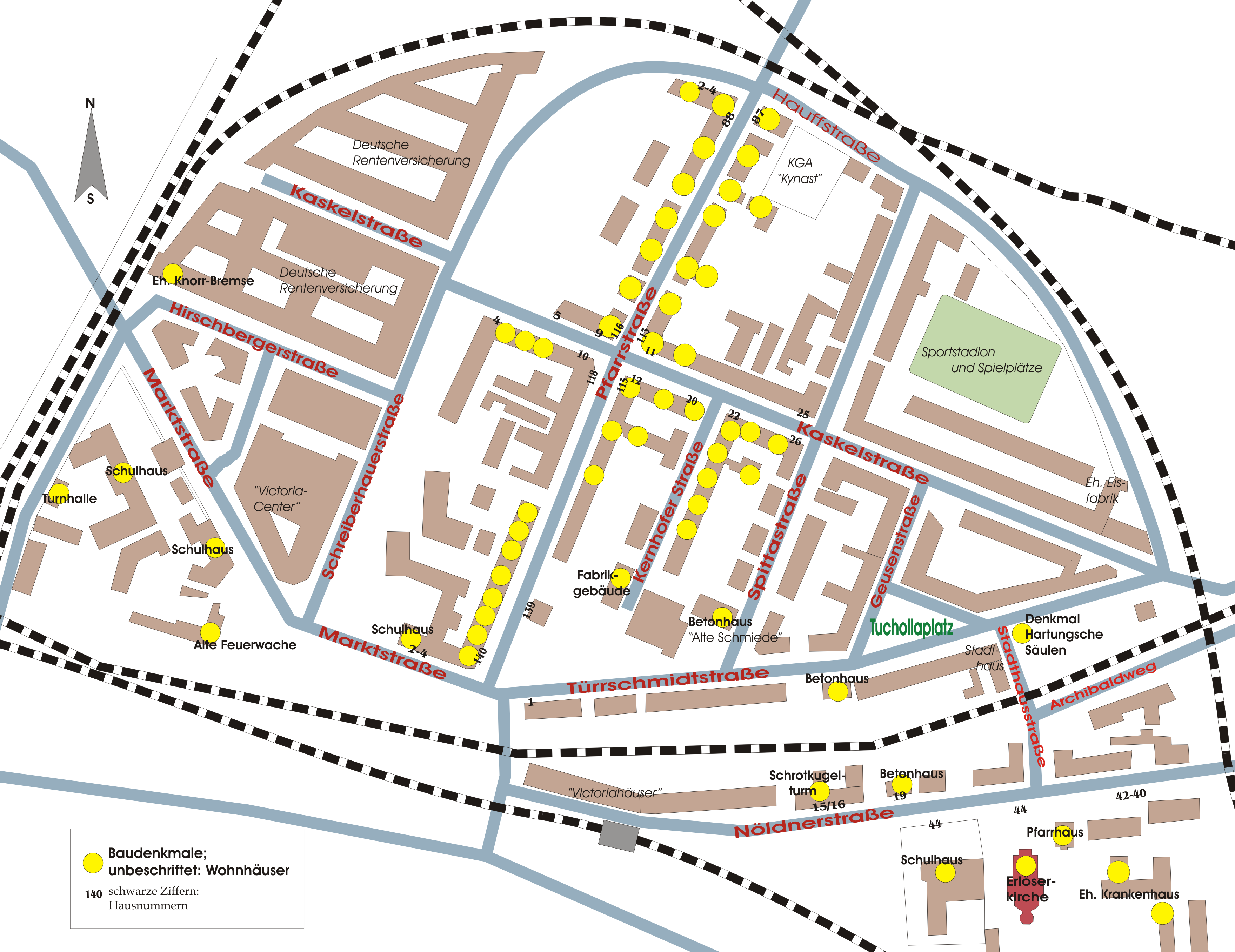 Lageplan des Kaskelkiezes mit gelb markierten Baudenkmälern